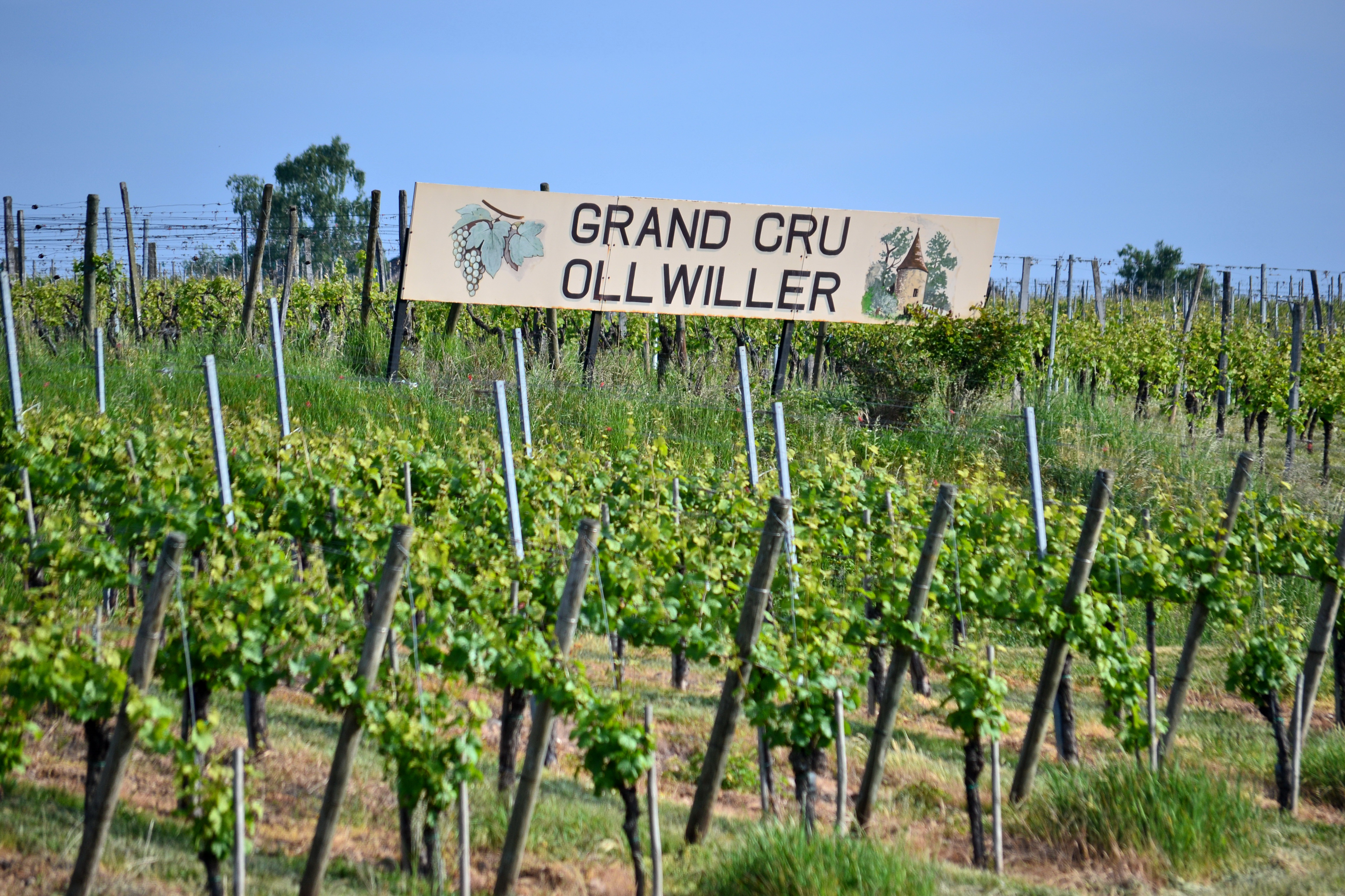 Vignoble Grand Cru Ollwiller, Wuenheim, Alsace, France